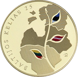 25 litas coin